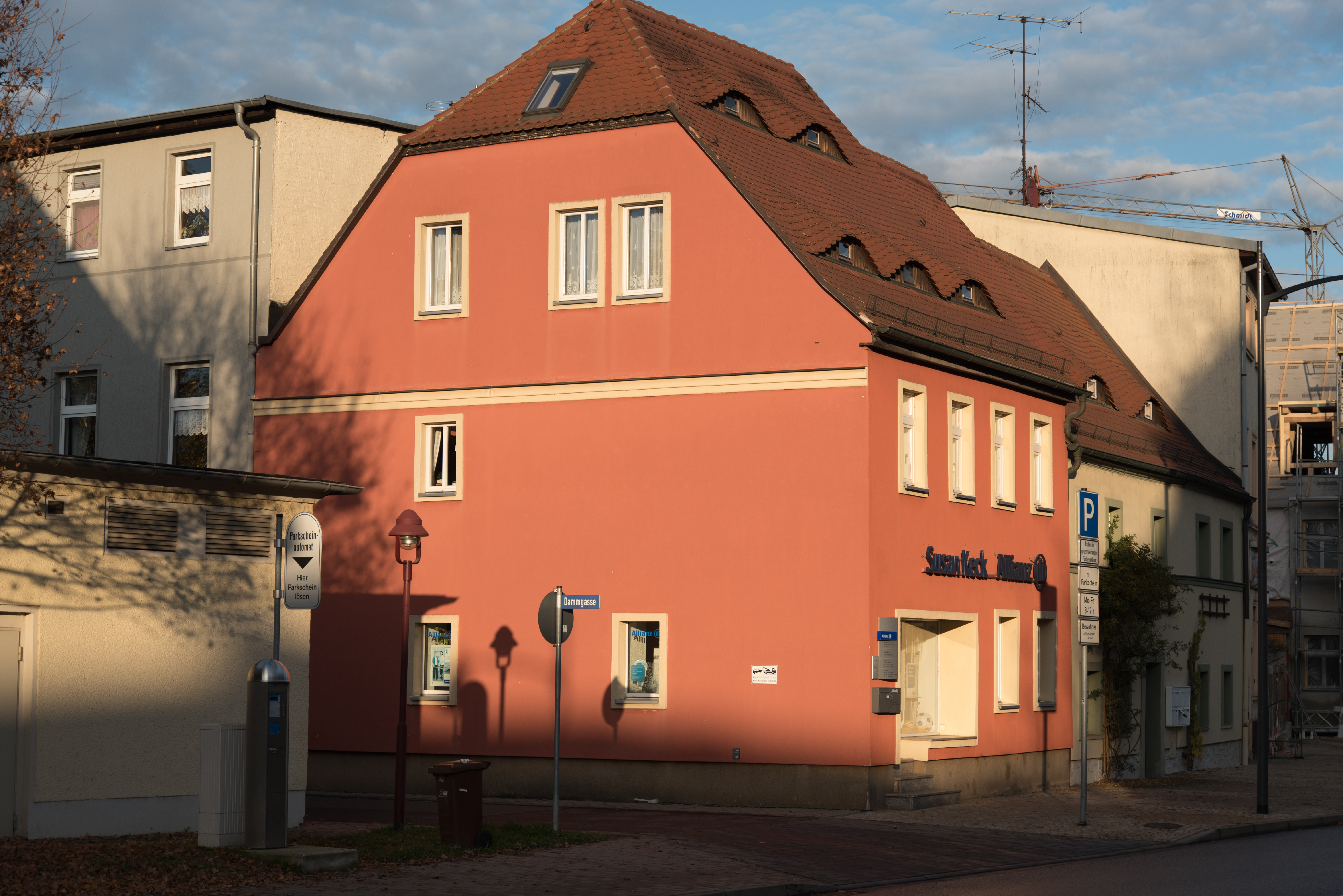 Weißenfels, Dammstraße 33